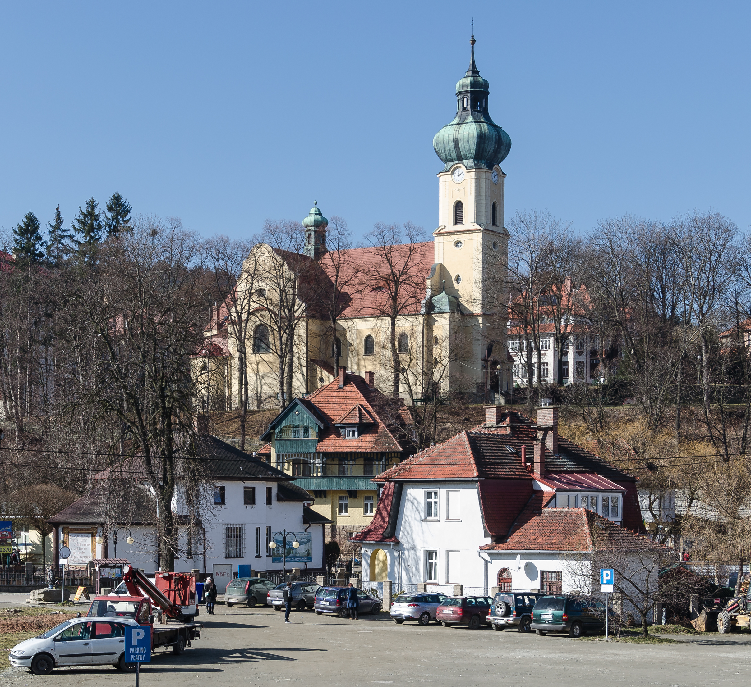 Polanica-Zdrój, kościół par. p.w. Wniebowzięcia NMP, 1910